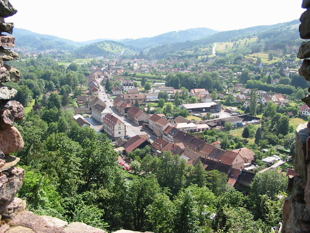 La Broque Commune du Bas-Rhin Vue plongeante depuis le château de Schirmeck Photographie personnelle, prise le 29 juin 2006 Copyright © Christian Amet